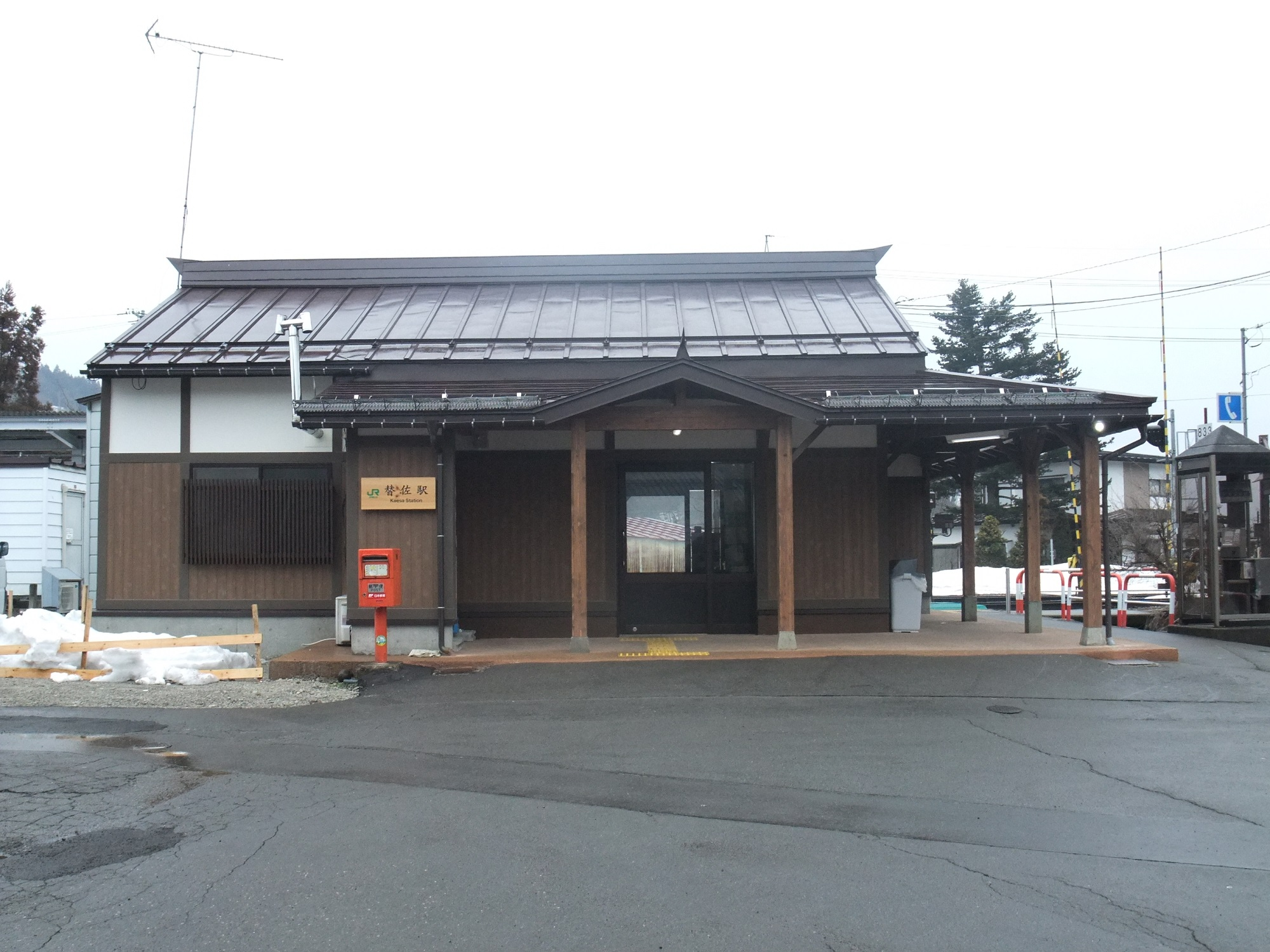 飯山線替佐駅